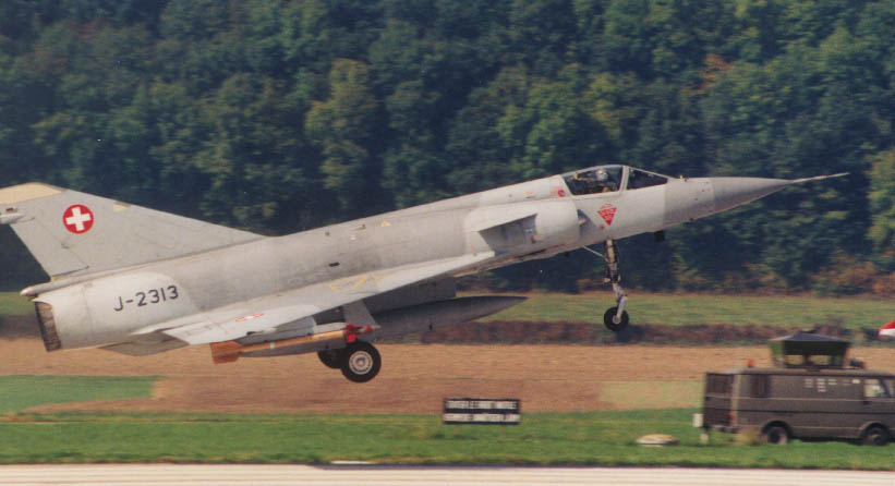 Mirage lift off at Flugplatz Dübendorf?